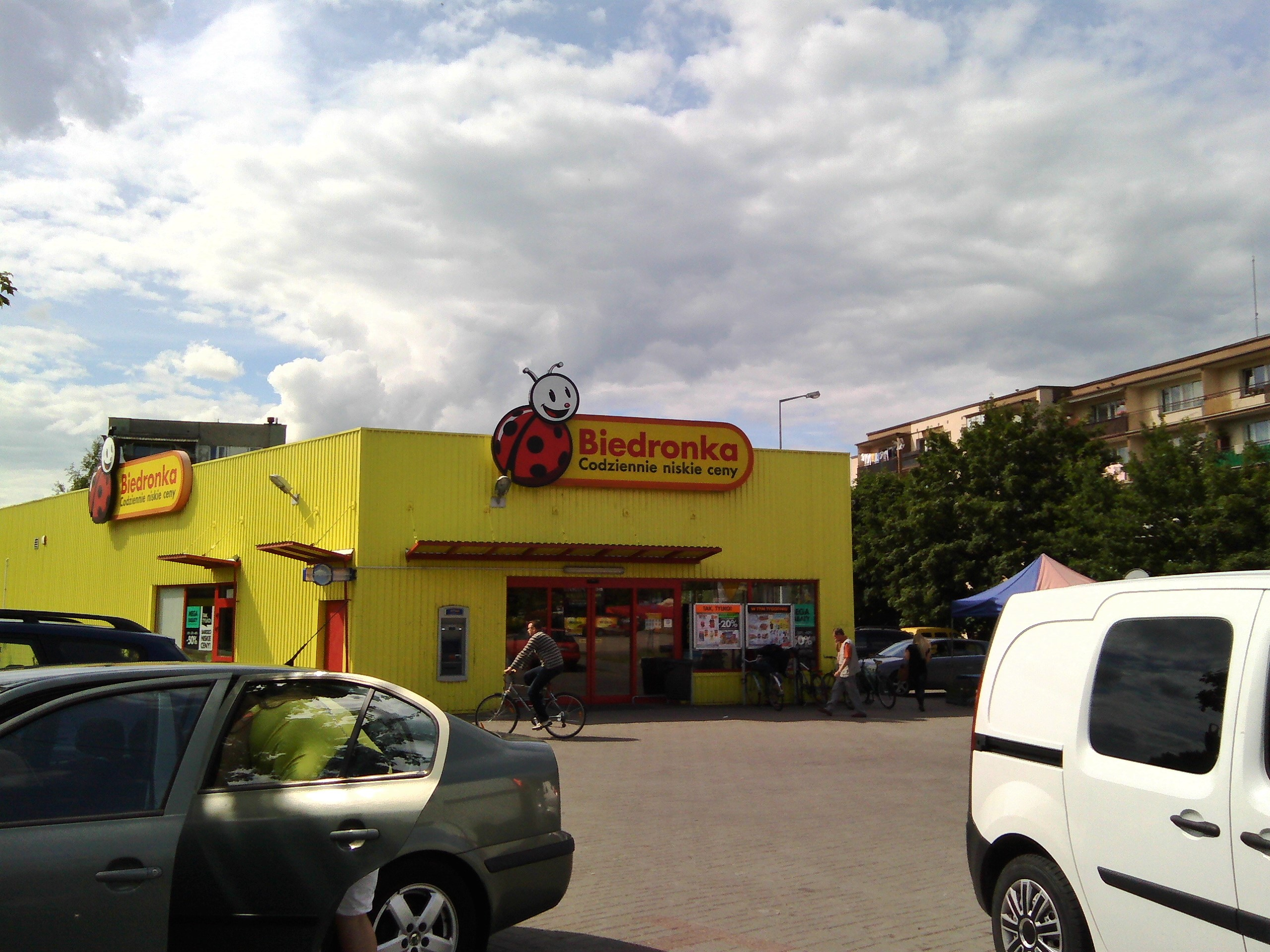 Biedronka Augustave